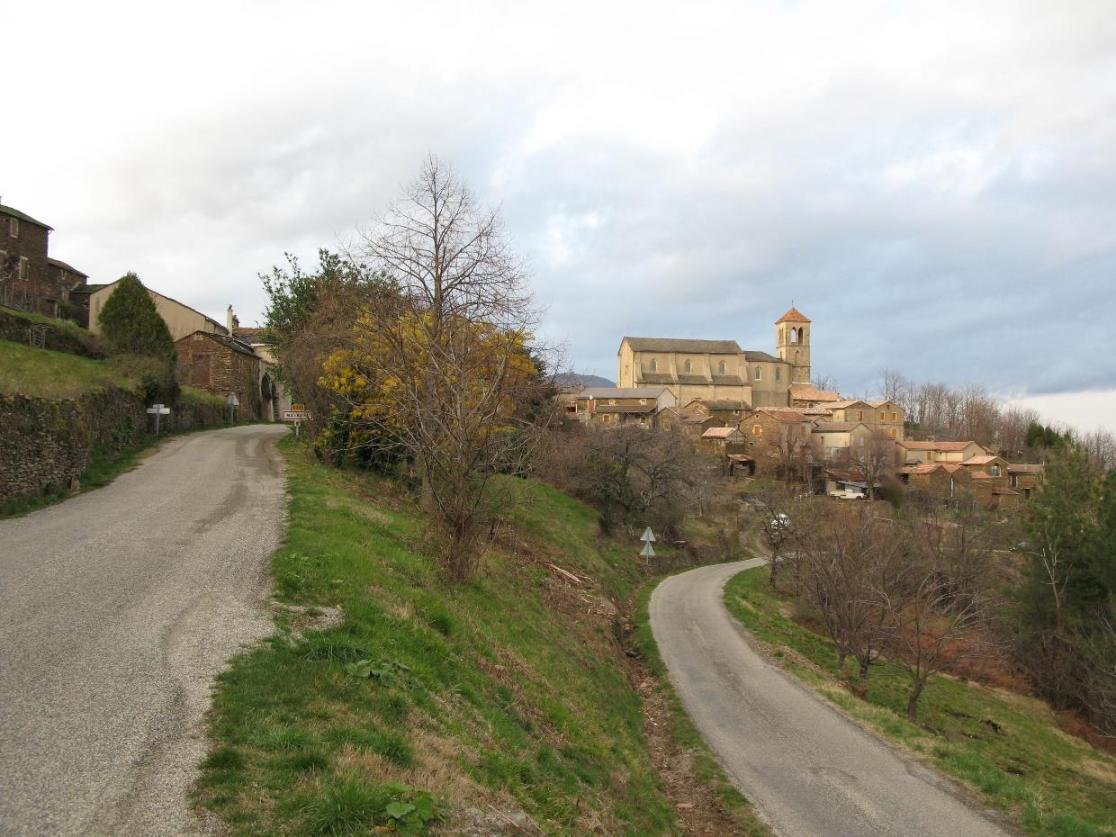 village de Malbosc (Ardèche)